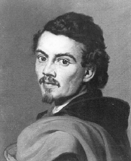 Autoritratto, lio su tela, 39 x 45 cm., Galleria Tadini, Lovere